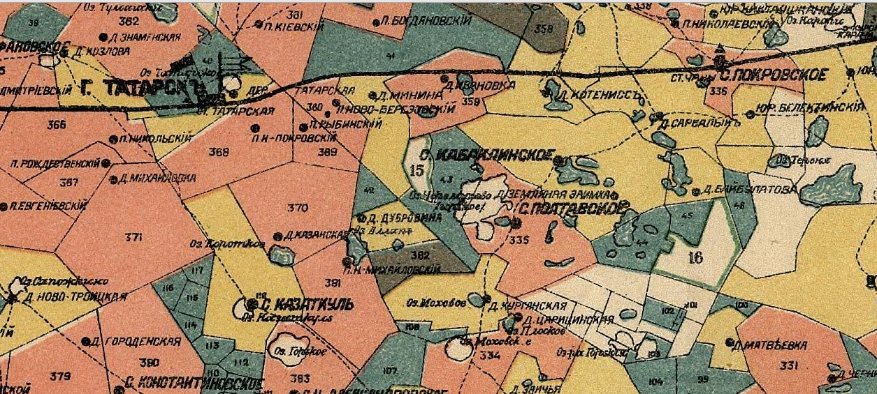 д. Минина - земля крестьян-старожил с законченным землеустройством